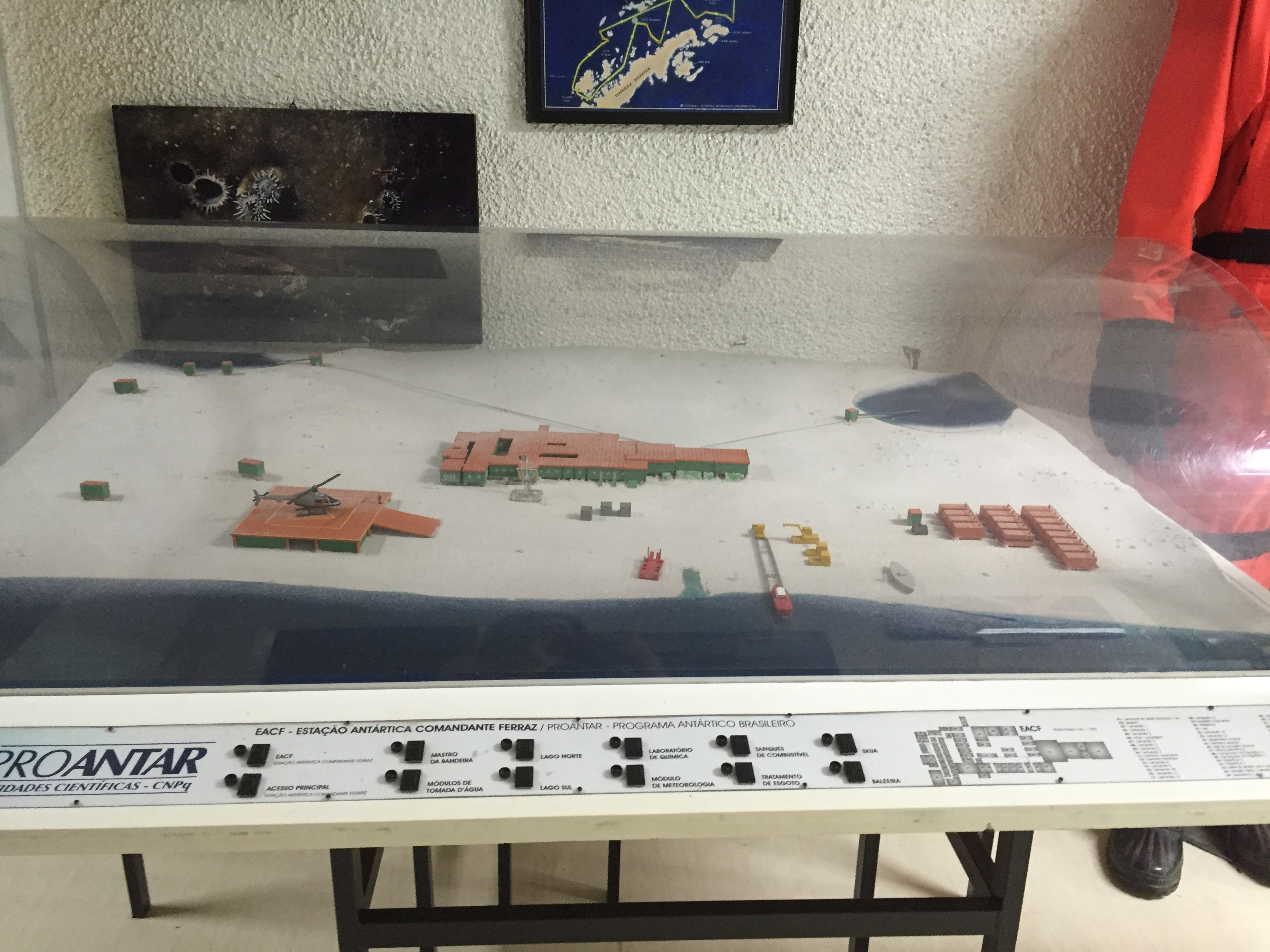 Maquete da antiga base brasileira na Antártica (EACE - Estação Antártica Comandante Ferraz), destruída após um incêndio.